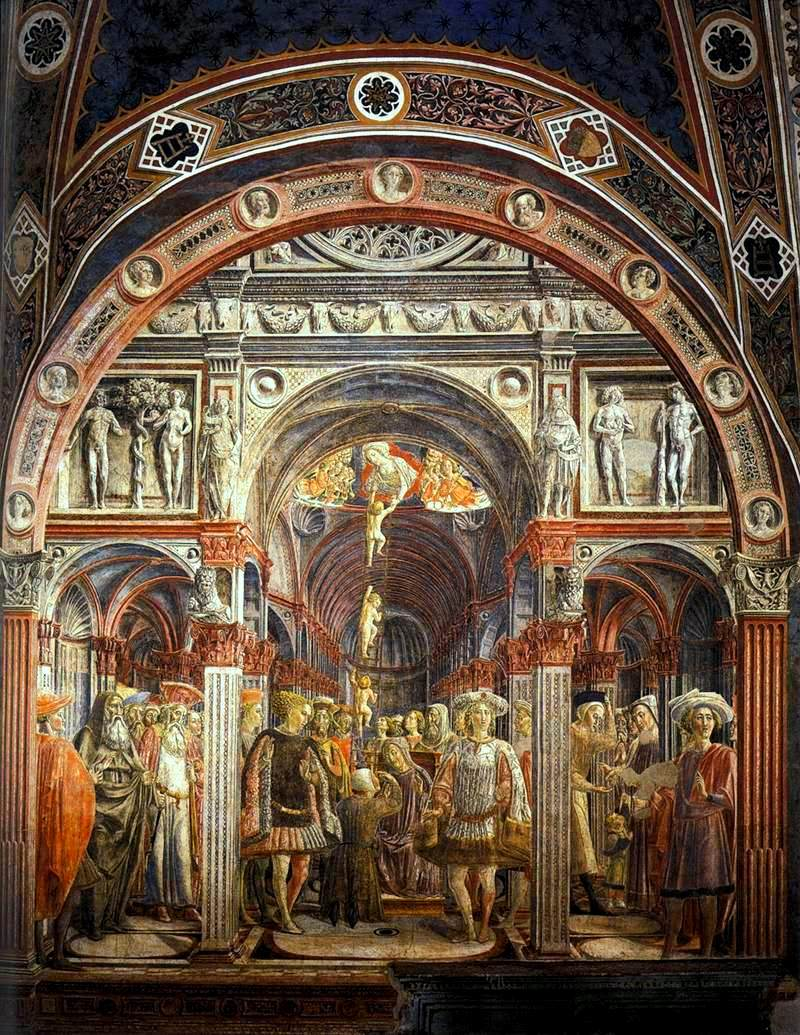 Vecchietta. The Founding of Spedale di Santa Maria della Scale.fresco.Siena.